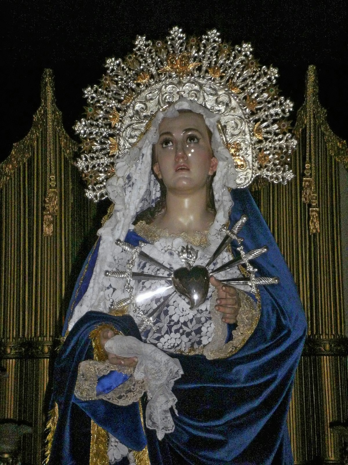 La Vírgen de Los Dolores en su trono para el Triduo 2012 celebrado en su honor.